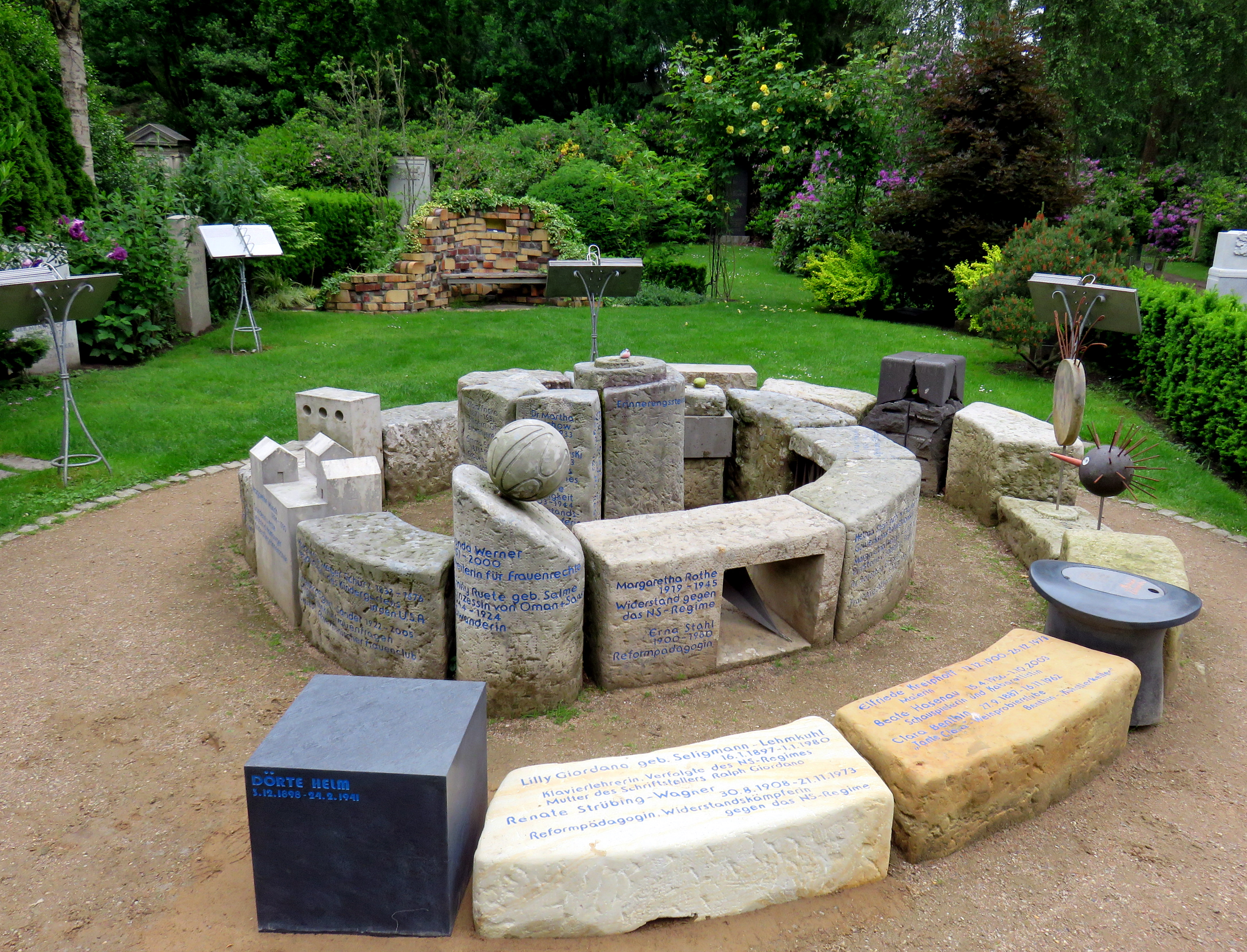 Die „Erinnerungsspirale“ im Bereich des Gartens der Frauen auf dem Ohlsdorfer Friedhof in Hamburg-Ohlsdorf nach Hinzufügung der Gedenksteine für Lilly Giordano/Renate Strübing-Wagner und Dörte Helm am 11. Juni 2020.